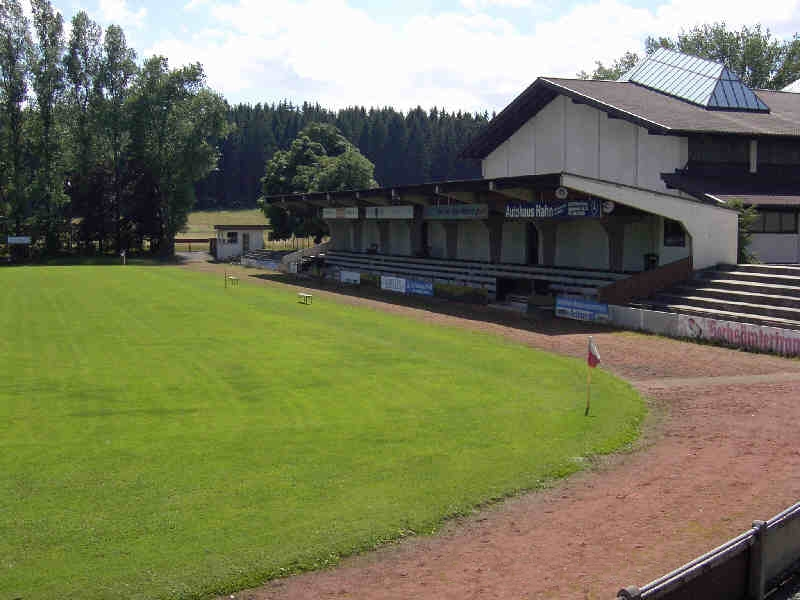 Ansicht des Stadions des VFB Helmbrechts